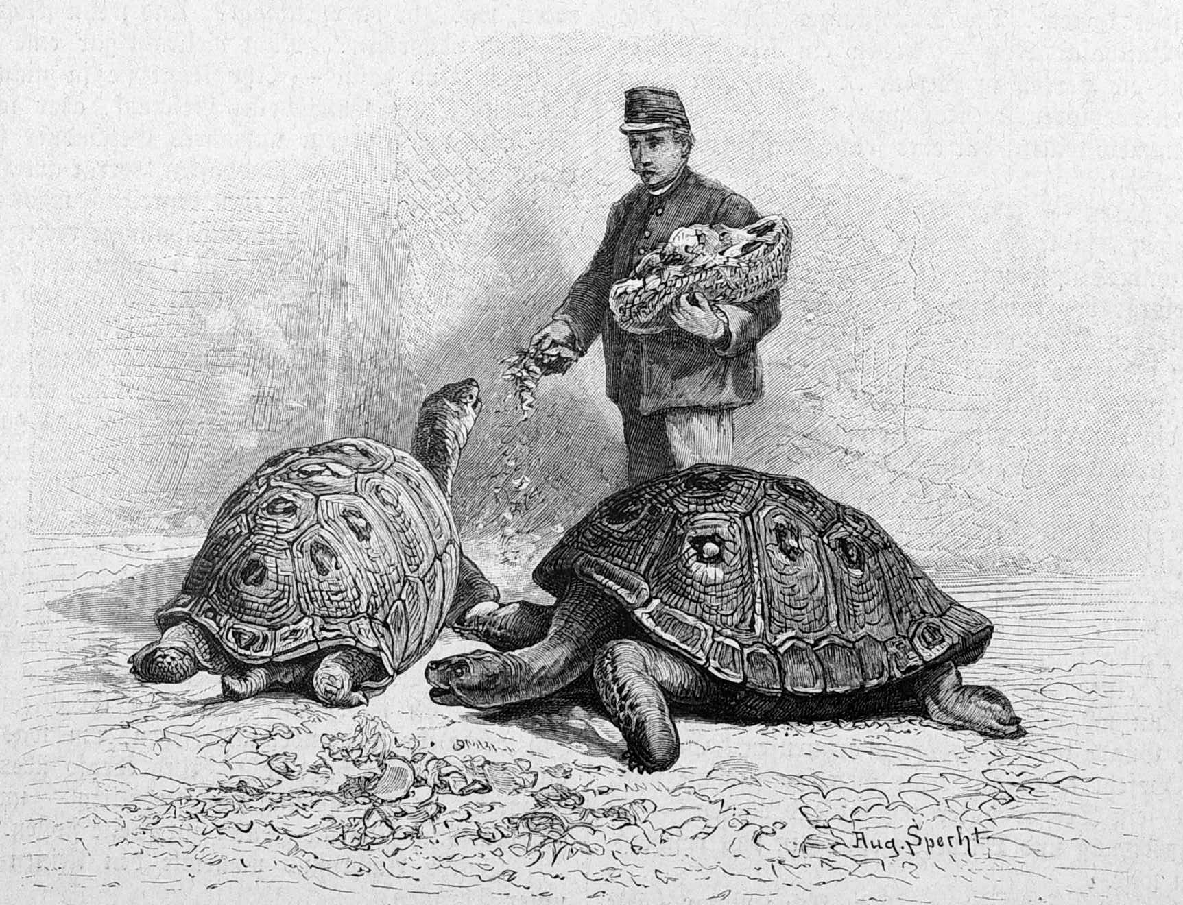 Elefantenschildkröten in Hamburg Zoo